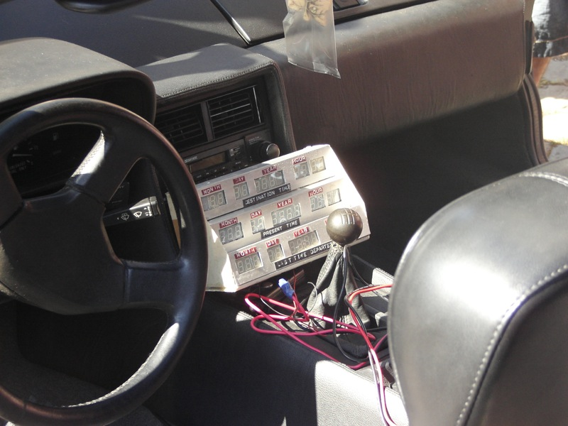 De Lorean DMC-12 timer